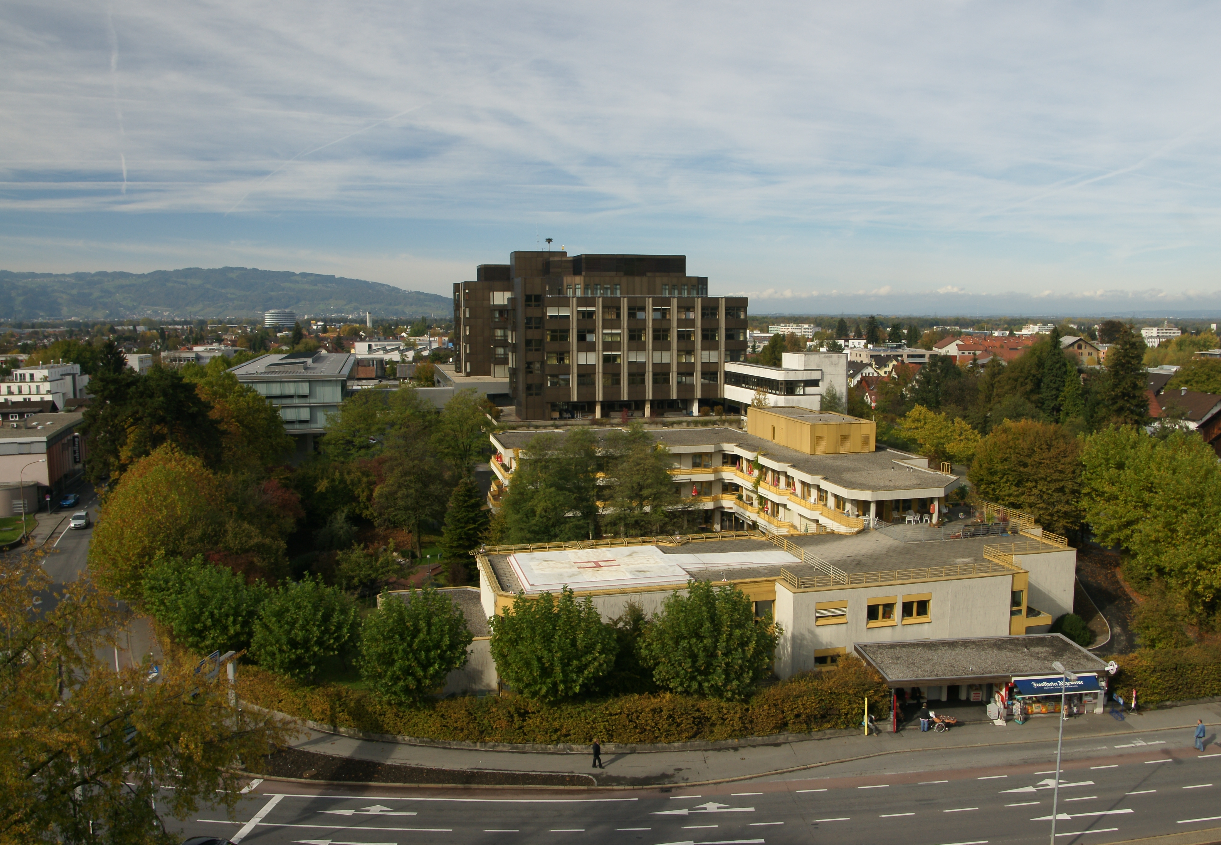 Am 1. Dezember im Jahr 1983 wurde das neue Krankenhaus der Stadt Dornbirn im Bezirk Hatlerdorf eröffnet. Im Vordergrund das Alten- und Pfelgeheim mit dem Hubschrauberlandeplatz für das Stadtspital.